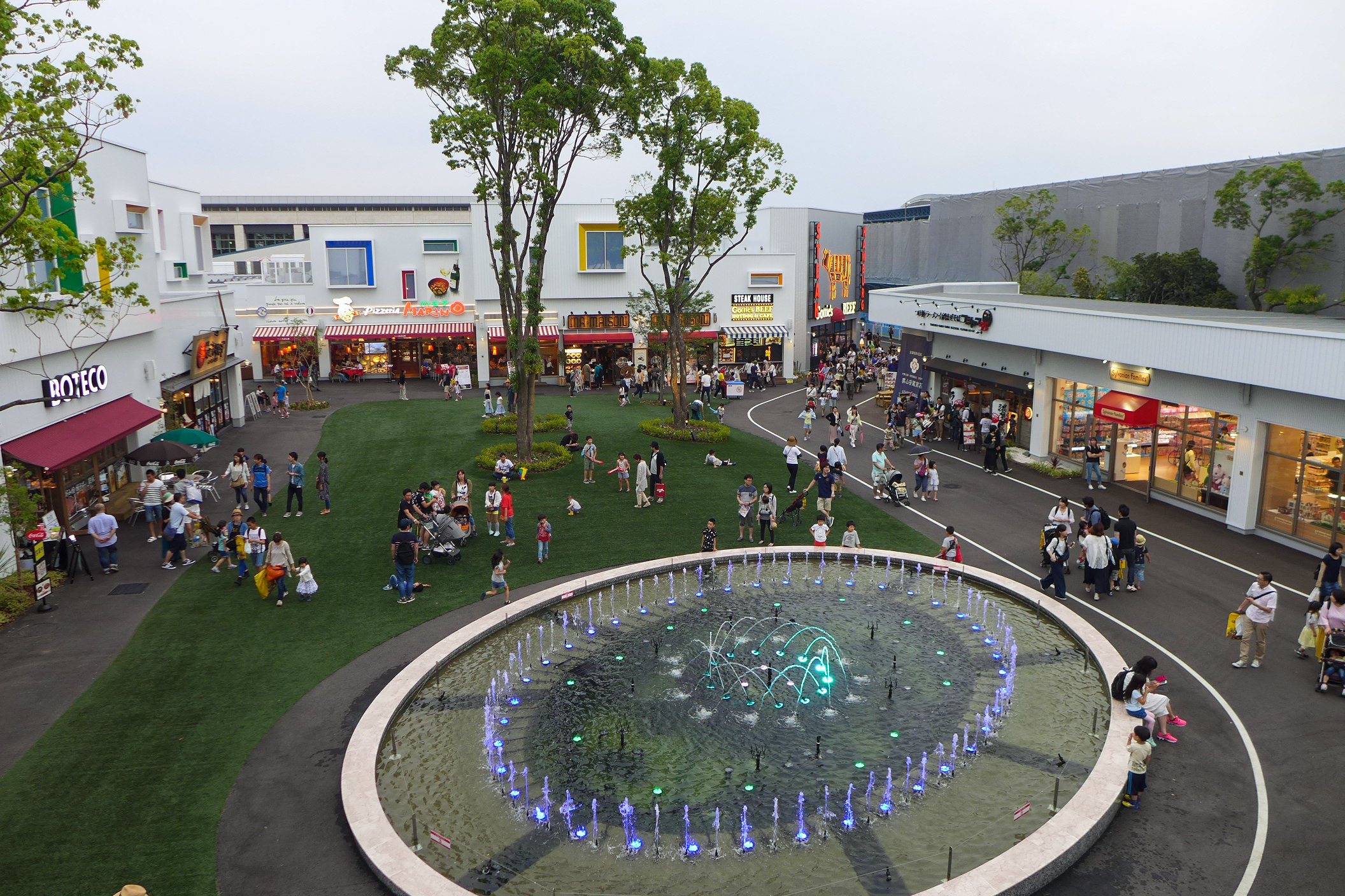 Maker’s Pier Overview